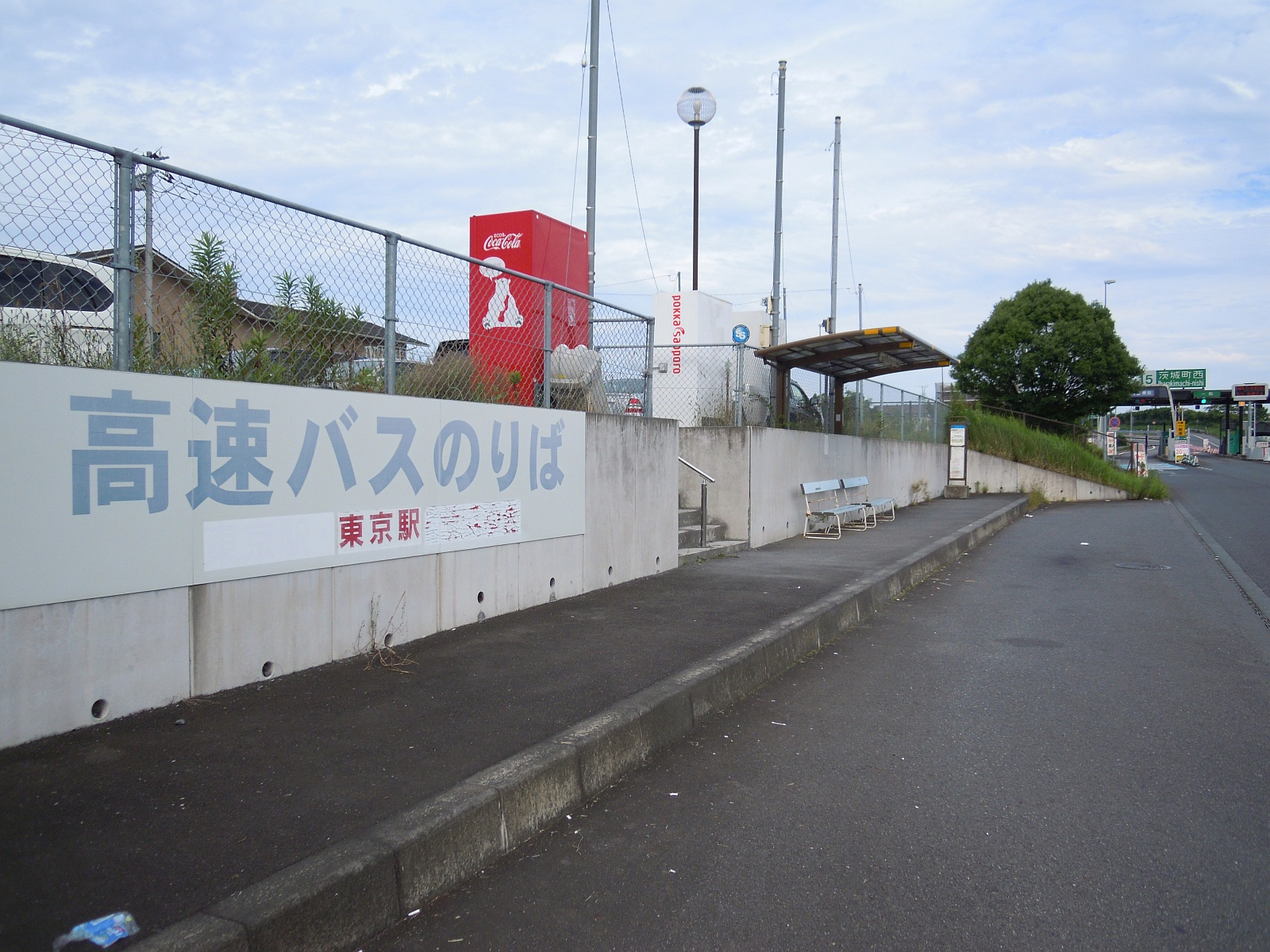 茨城県東茨城郡茨城町の北関東自動車道茨城町西インターチェンジの一般道側にある茨城町西インターバス停。右奥に見えるのは茨城町西インターチェンジ料金所。